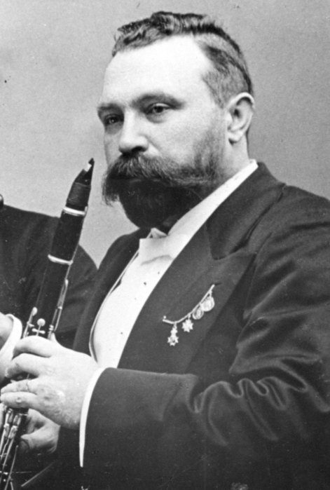 Рихард Мюльфельд